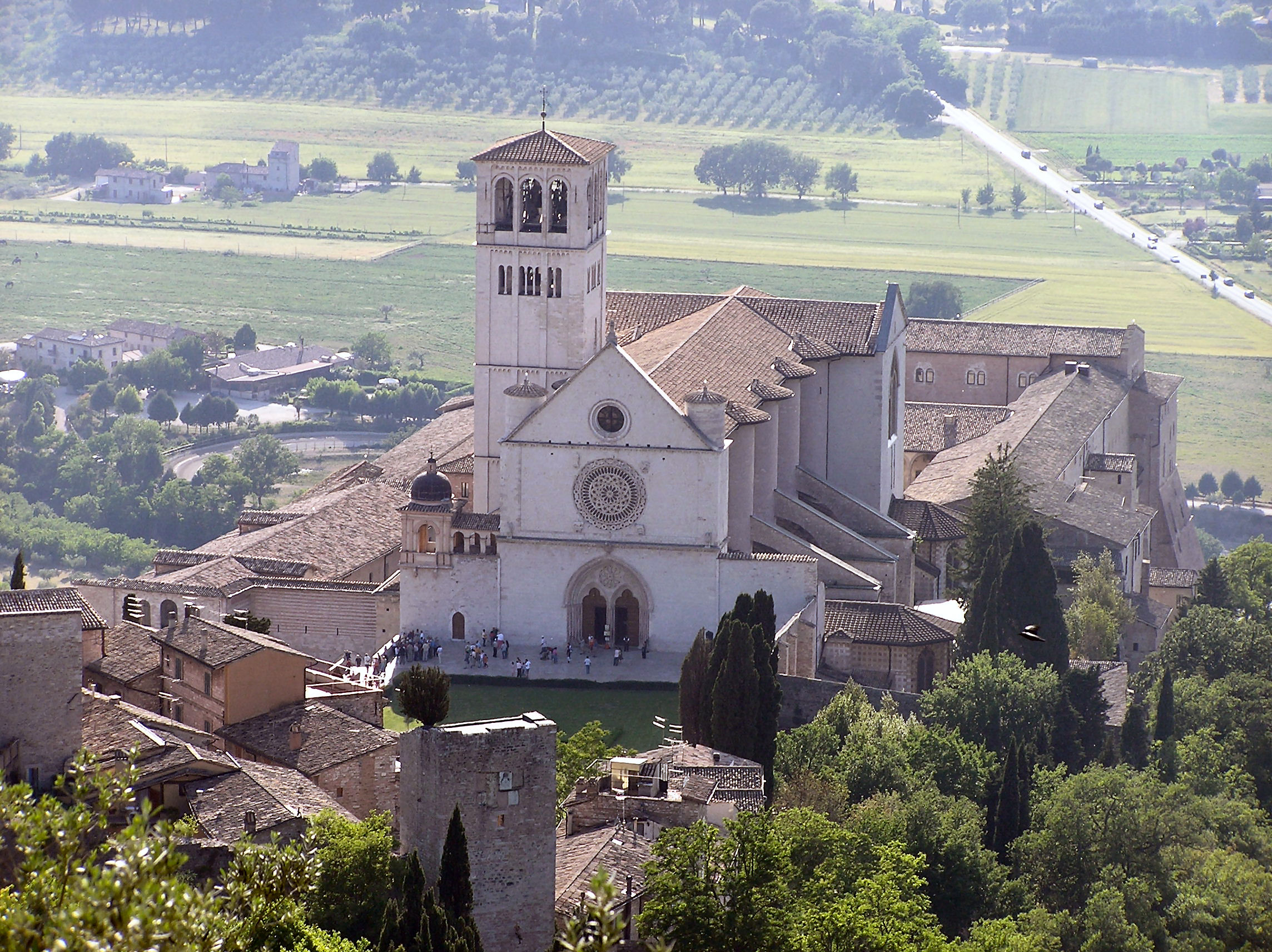 Assisi Basilica di San Francesco